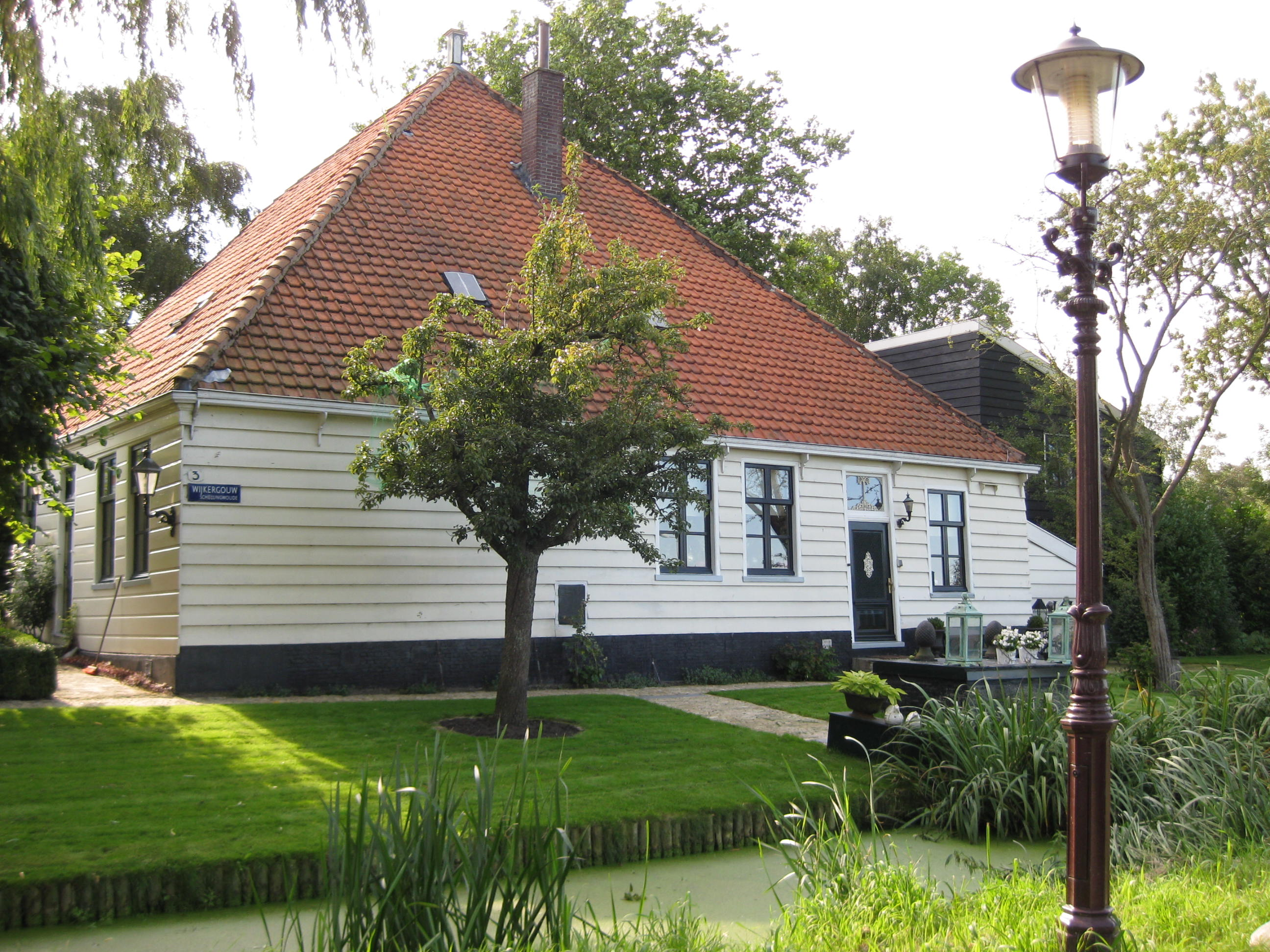 Boerderij Zeldenrust, Wijkergouw 3, Amsterdam-Noord